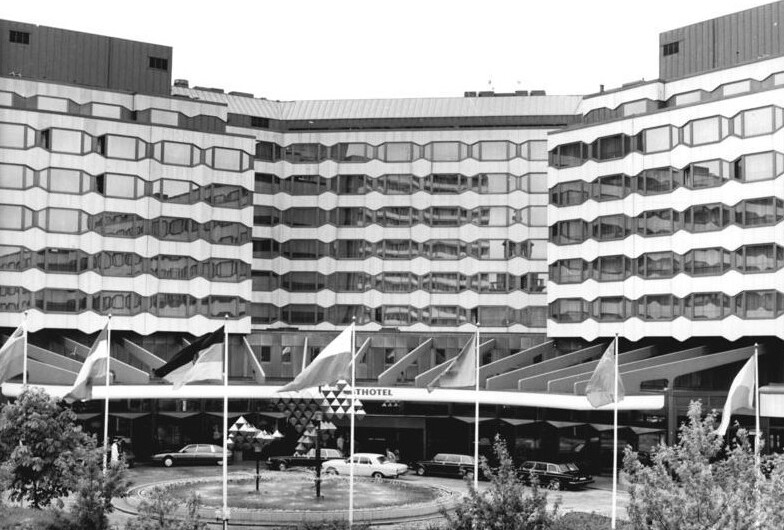 Berlin, "Palasthotel ADN-ZB Franke 28.5.87 Berlin: Tagung-Beratung - Das Palasthotel nahe dem Marx-Engels-Platz ist Tagungsstätte des Politischen Beratenden Ausschusses der Teilnehmerstaaten des Warschauer Vertrages.